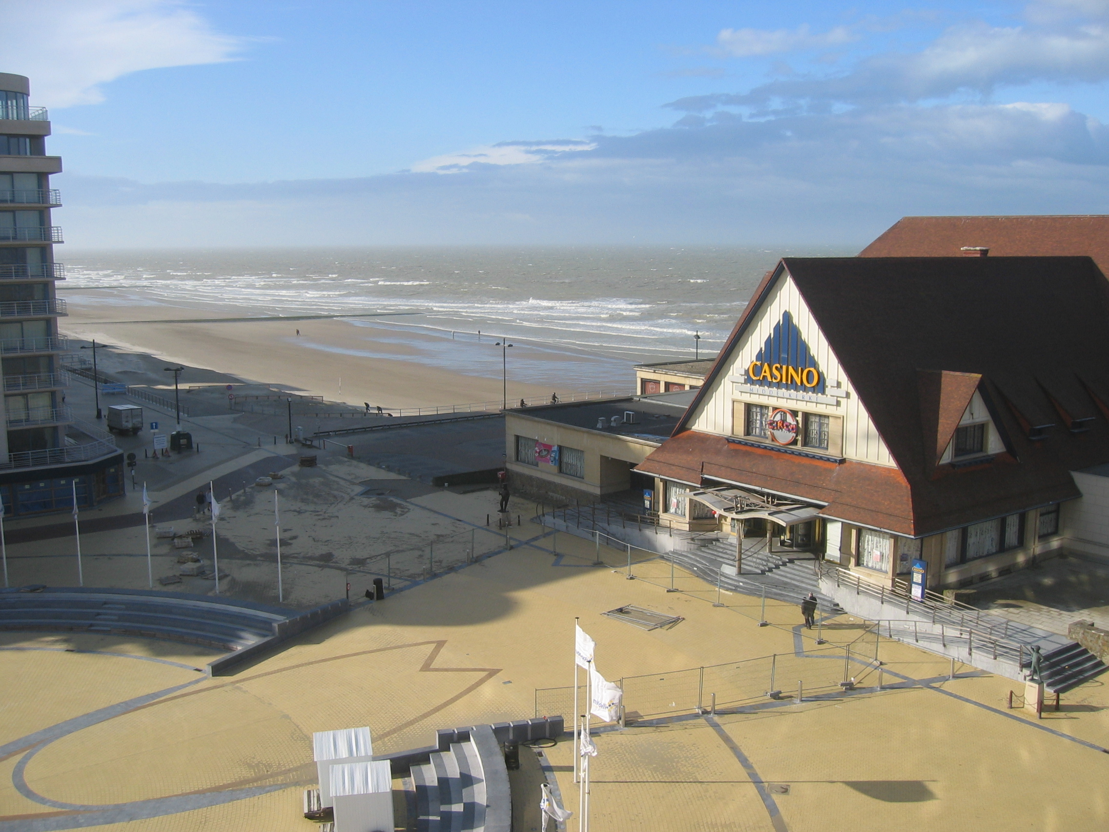 Zicht op het casino in Middelkerke, tegenover het in 2003 heraangelegde Epernayplein. Foto genomen vanuit appartement 6a, residentie Telstar. Tbc 15 feb 2005 12:15 (CET)